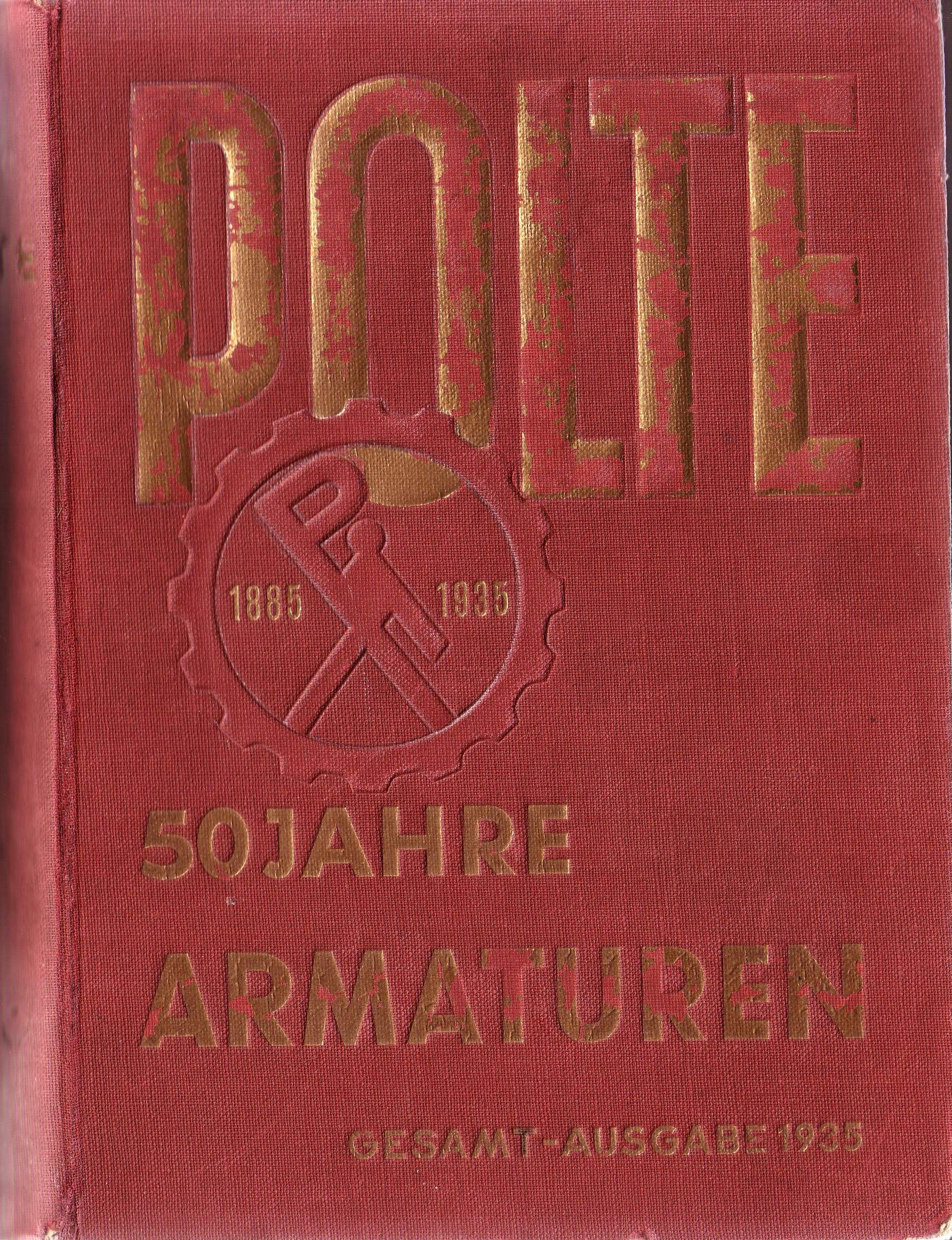 book, Polte Werke, 50 Jahre Katalog